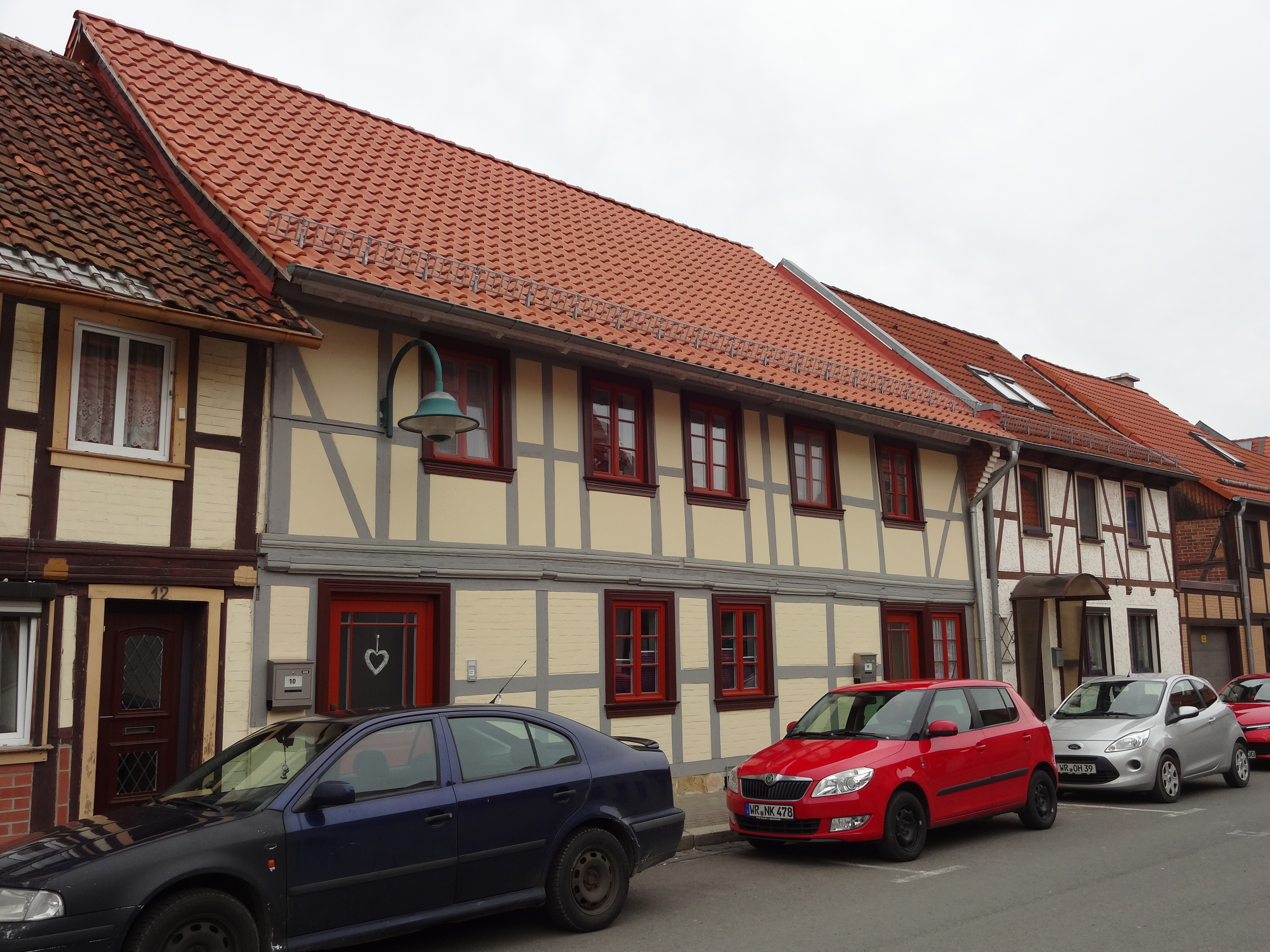 denkmalgeschütztes Fachwerkhaus in der Petersilienstraße 10 Derenburg, Ortsteil von Blankenburg (Harz)